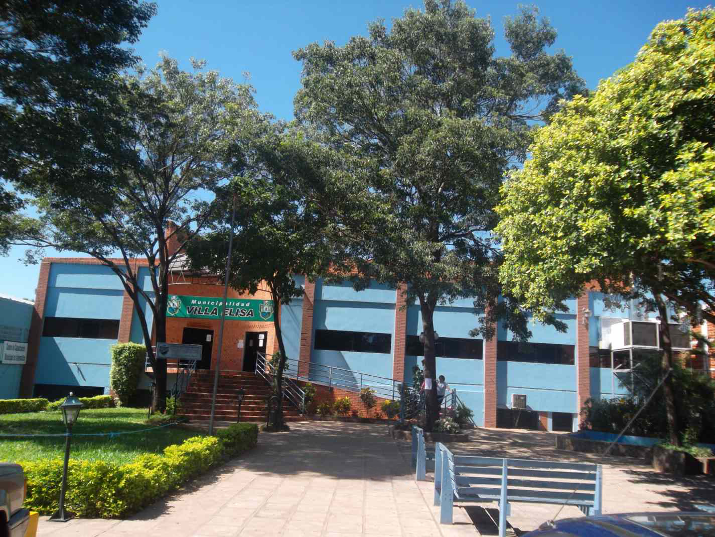 visita